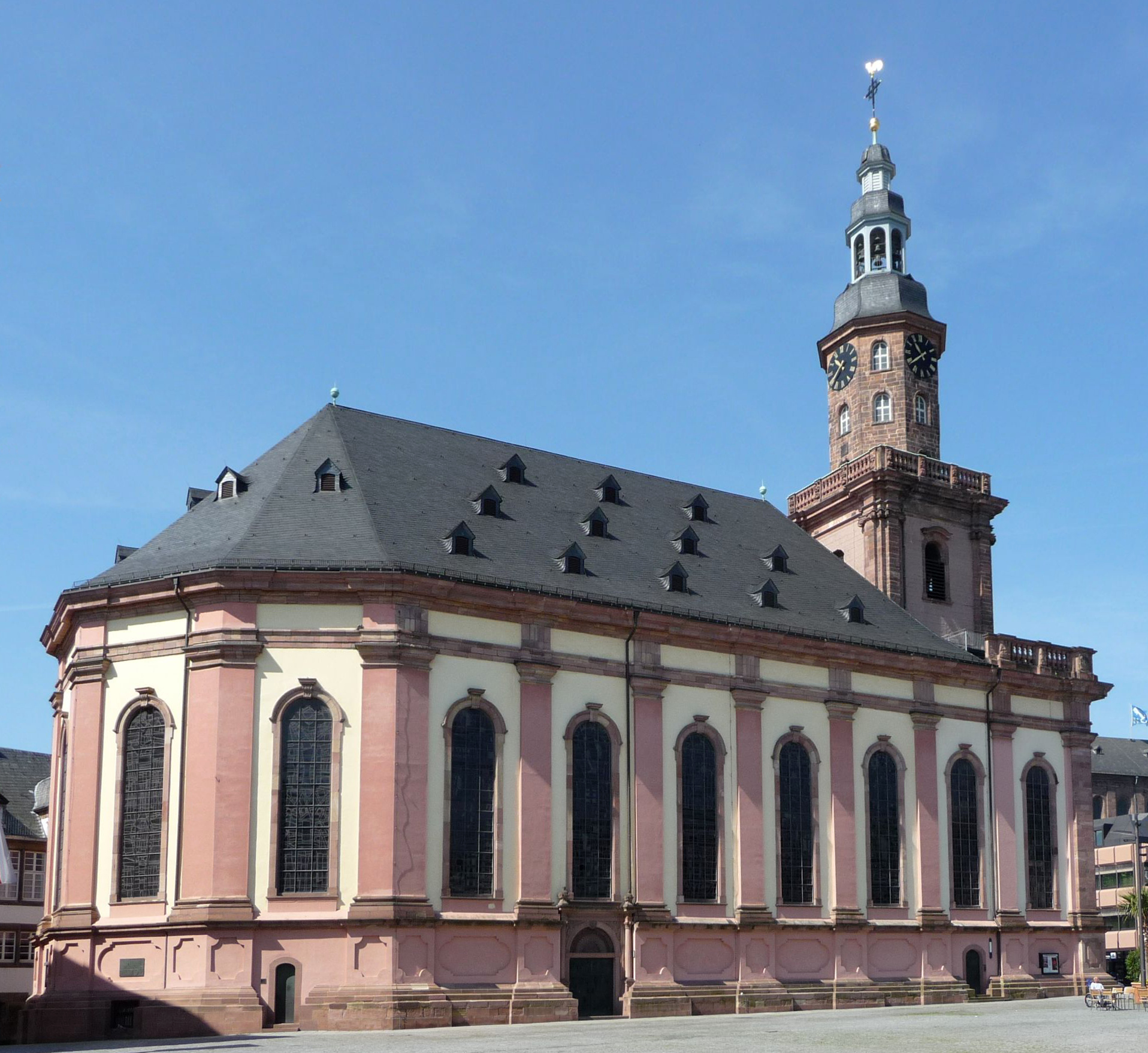 Dreifaltigkeitskirche Worms